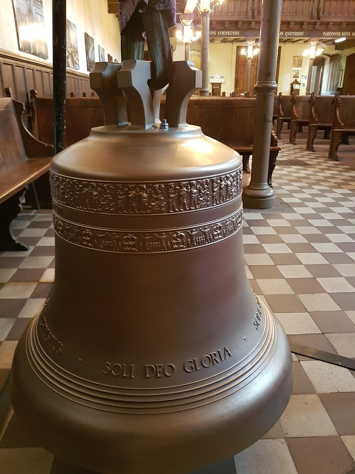 Nouvelle cloche du temple protestant de Lille fondue en 2017, à l'occasion du 500ème anniversaire de la Réforme protestante.